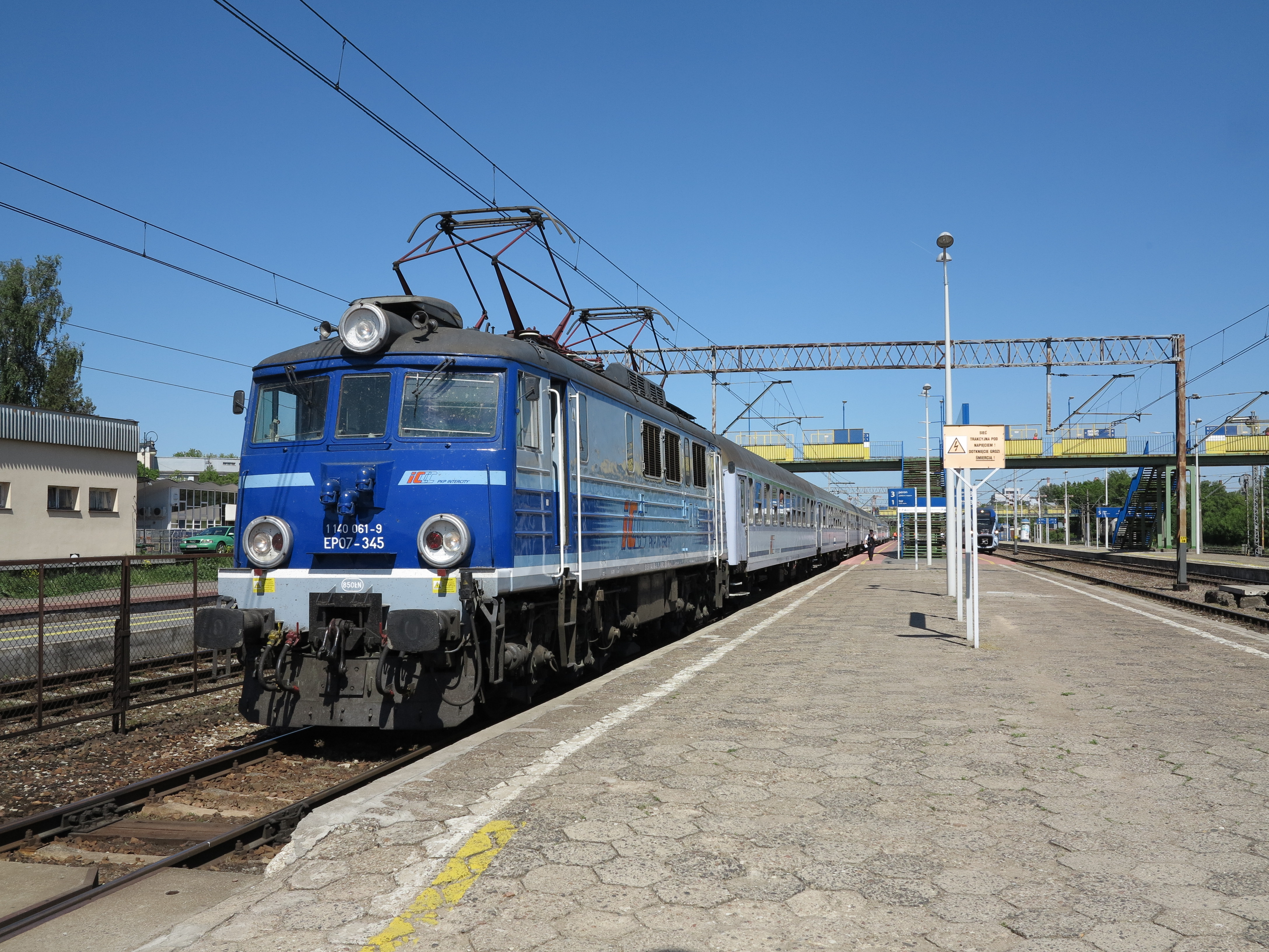 EP07-345 na stacji Białystok